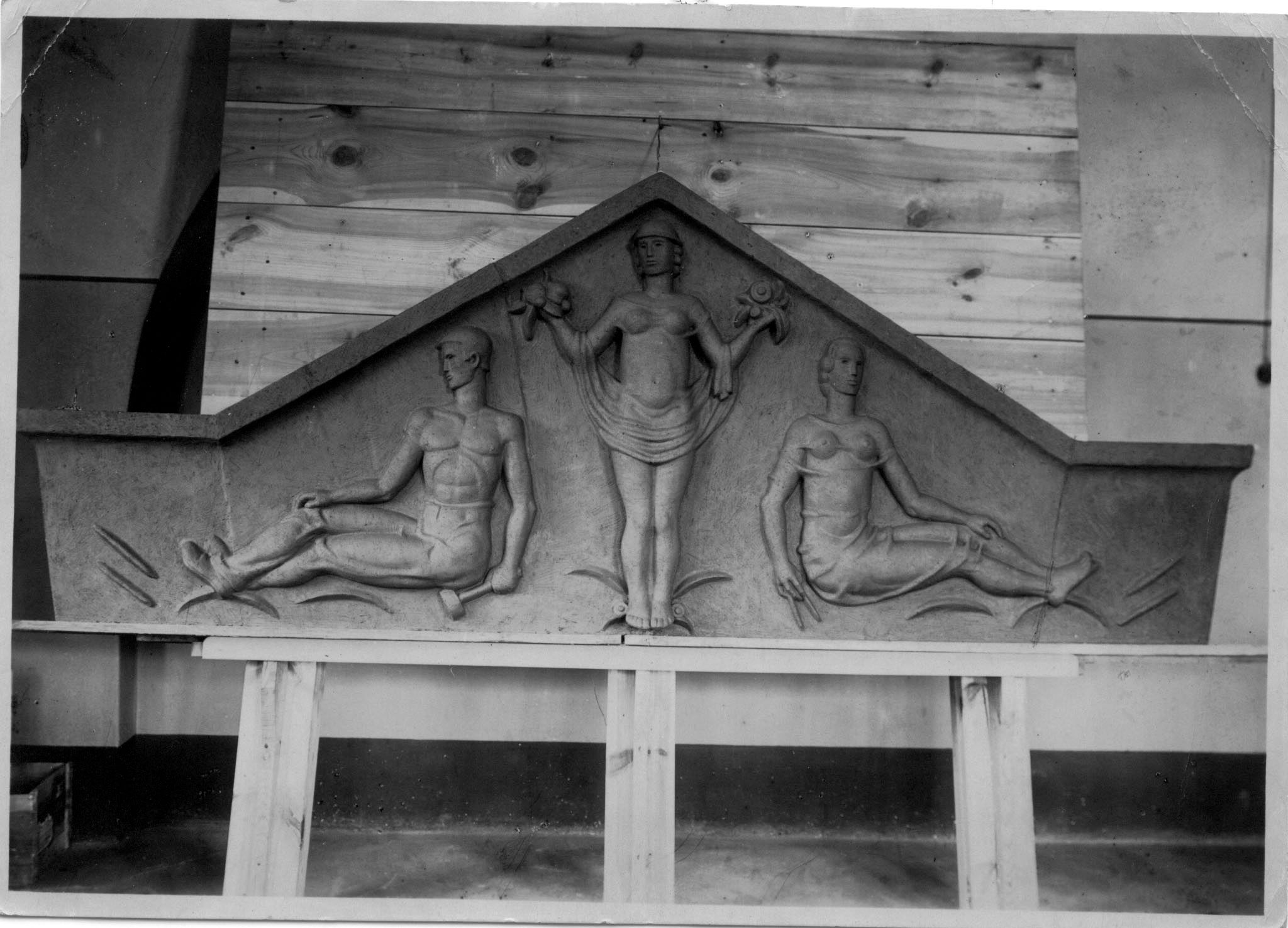 Klinkerkeramischer Portalgiebel von Augusta Kaiser für das Jugendheim im Werftpark Kiel-Gaarden, 1924/1925; beschrieben und abgebildet in: Konietzny 2017, Katalog-Nr. 54. und 54.1. Werkaufnahme in der Manufaktur (12,4 cm x 17,4 cm), rückseitig bezeichnet: „Gust Kaiser. Giebel Werfthaus Kiel 2 m H 3 m B“; aus dem Nachlass.